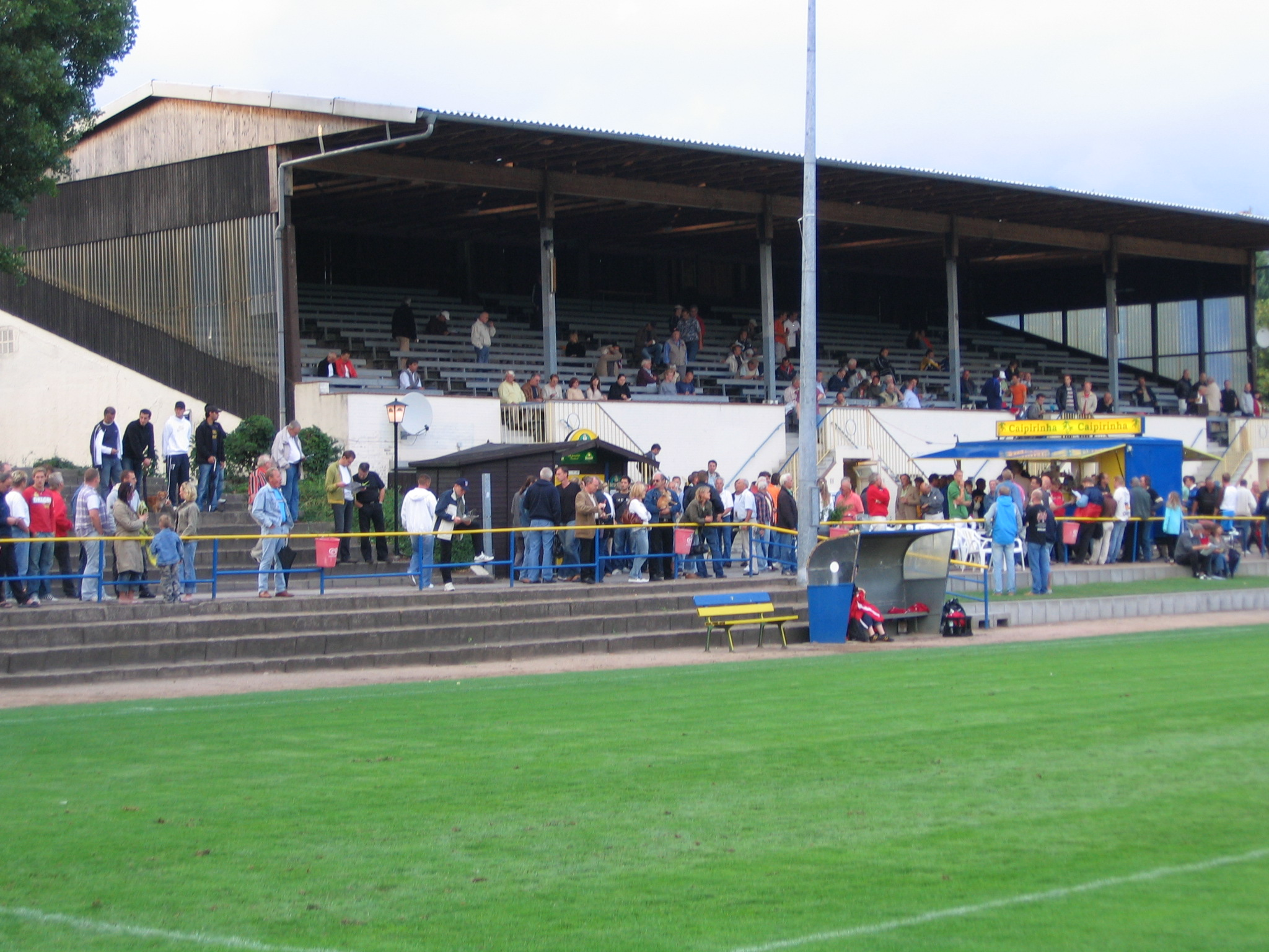 Haupttribüne des Stadions Hohe Luft in Hamburg.